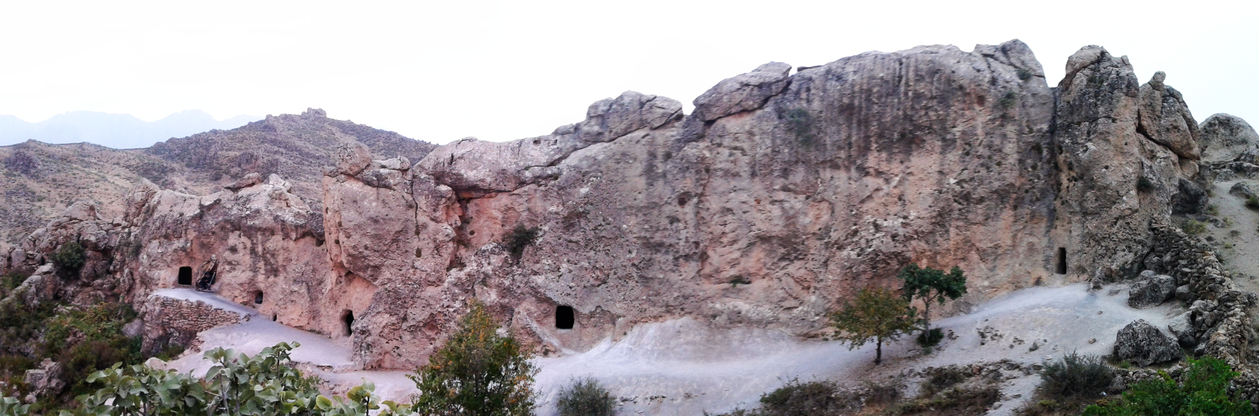 نمایی پانورامایی از تمامی دالان‌ها و ورودی‌های غار سنگی حسین کوهکن